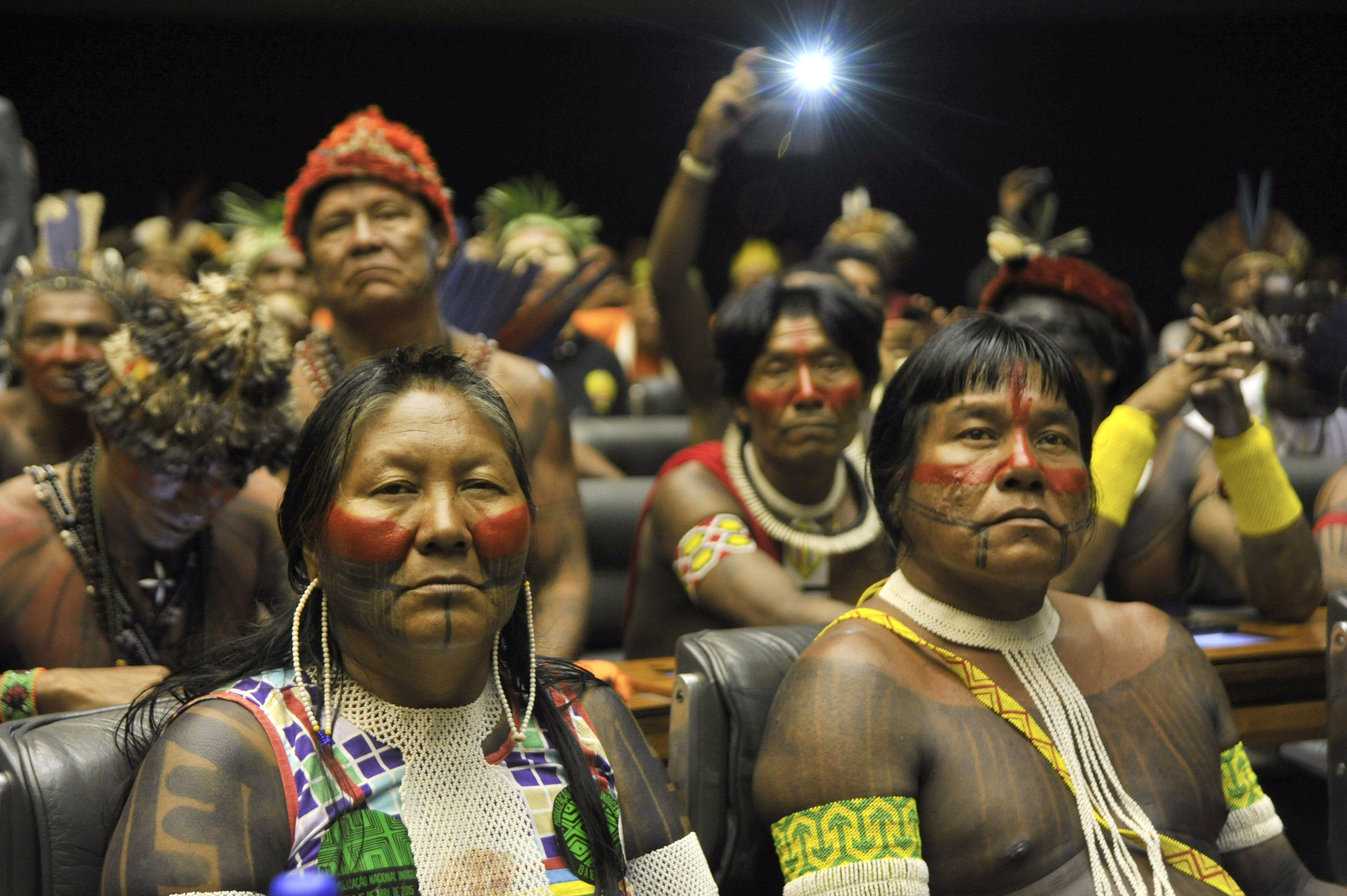 Plenário da Câmara dos Deputados durante sessão solene em homenagem ao Dia do Índio, comemorado em 19 de Abril. Desde terça-feira (14), quando deram início ao Acampamento Terra Livre, as lideranças indígenas cumprem agenda no Parlamento onde apresentam suas reivindicações. Povos indígenas. Foto: Geraldo Magela/Agência Senado